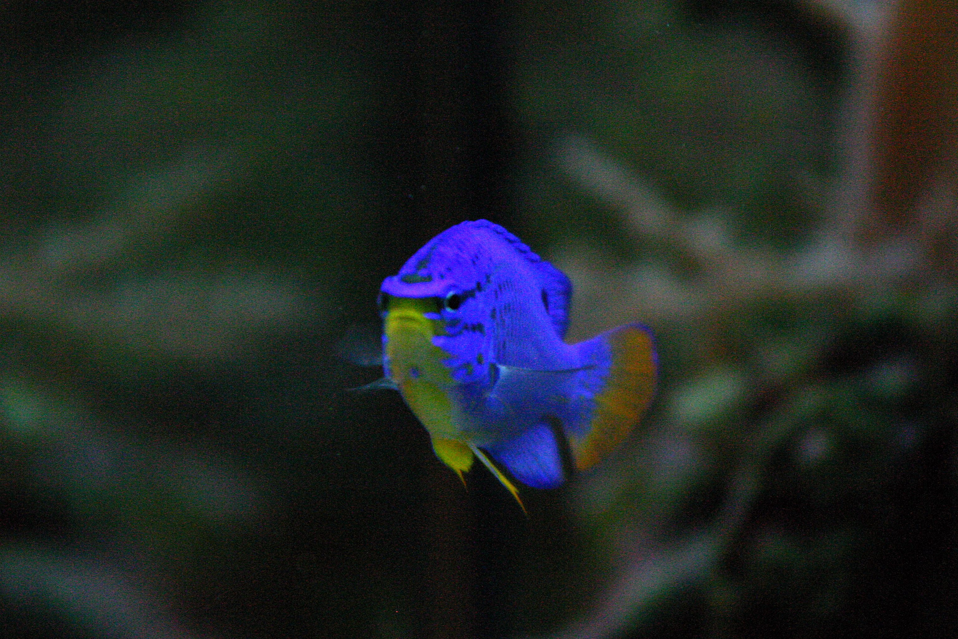 Chrysiptera cyanea en acuario de arrecife